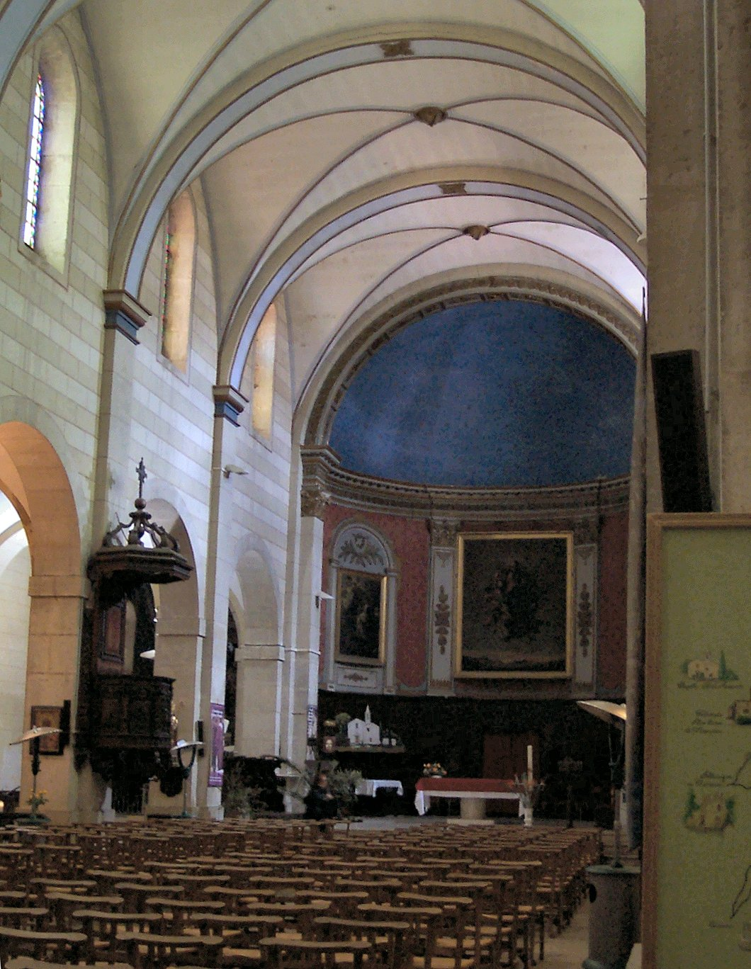 Église Notre-Dame de l'Assomption de Riez (chœur), ancienne cathédrale Notre-Dame-de-la-Sède, reconstruite au milieu du XIXe.